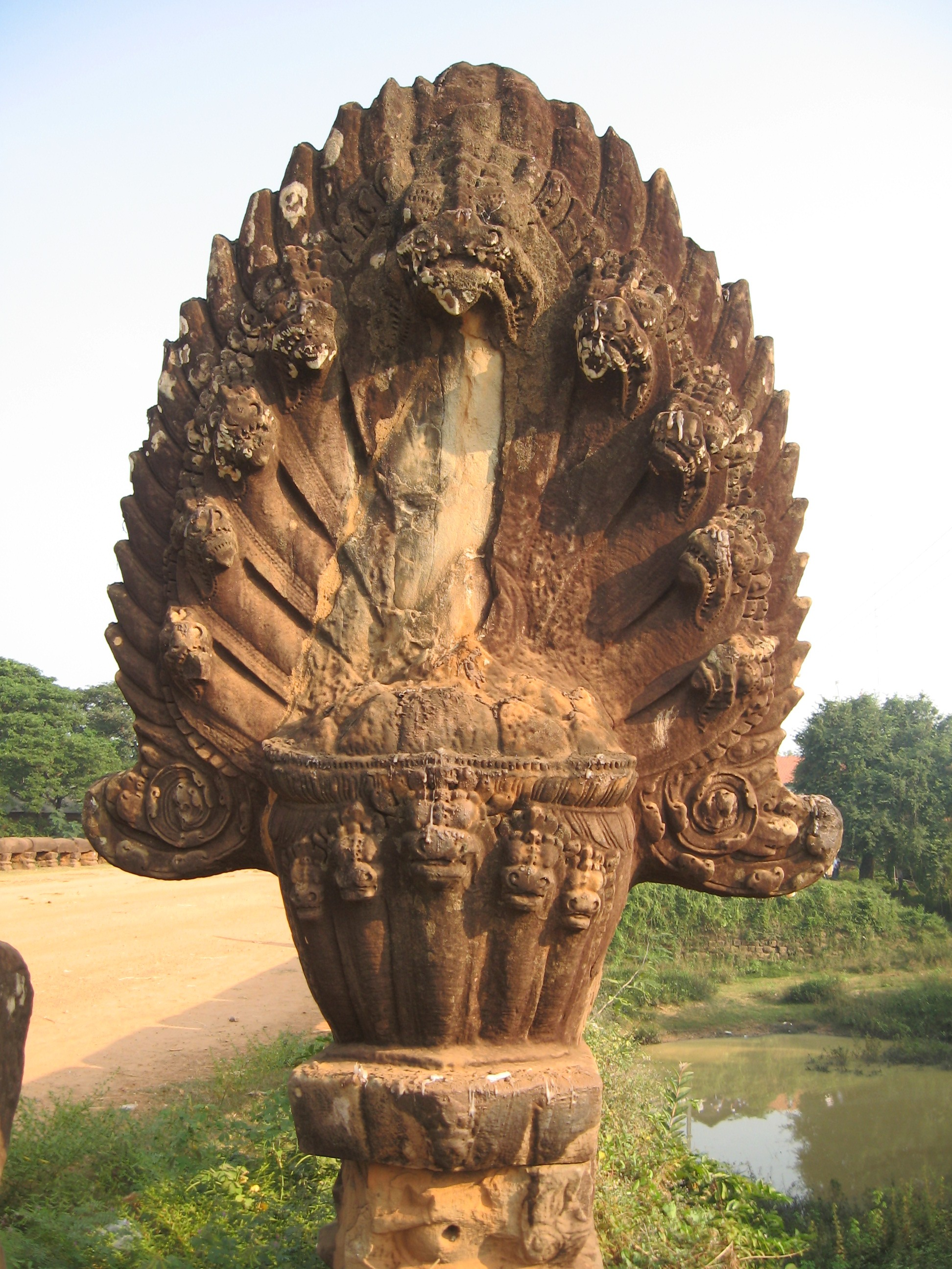 Phan Minh Châu chụp tại cầu cổ Kampong Kdai - Siêm Riệp